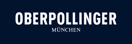 Das aktuelle Logo des Oberpollinger seit 2010